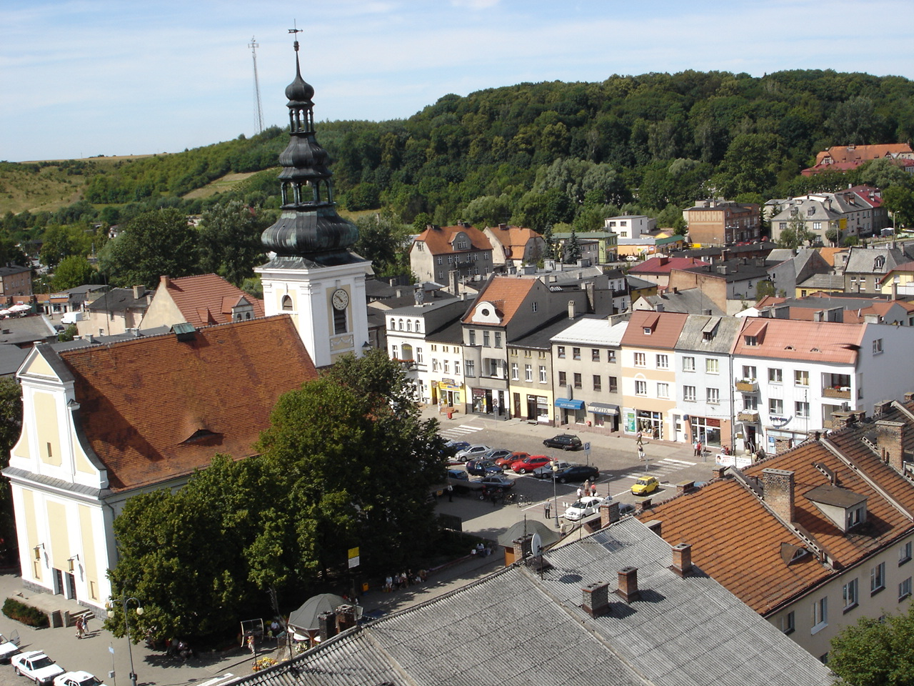 Nowe Miasto Lubawskie - dawny kosciół ewangelicki, 1911-12, 1958 (po wojnie kino "Harmonia")